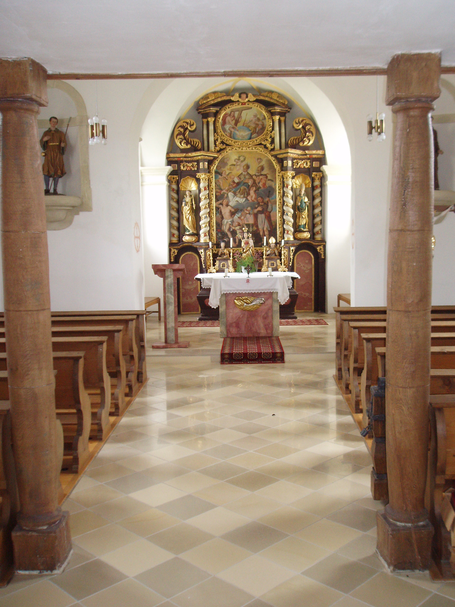 Grashausen_im_Landkreis_Eichstätt,_Kircheninneres